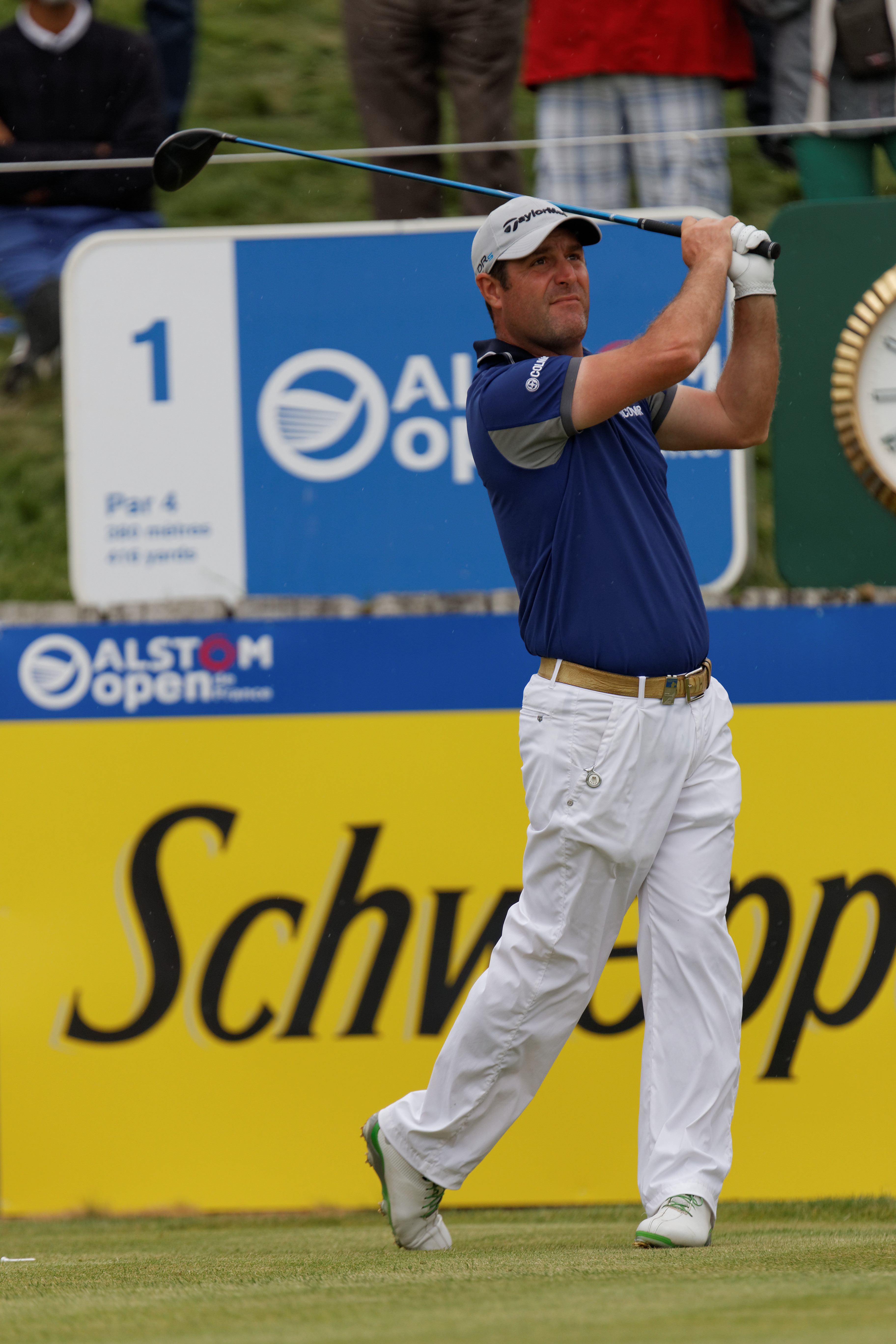 Marco Crespi lors du second tour de l'Open de France 2014 - Golf National - Saint-Quentin-en-Yvelines (78) - départ du trou n°1